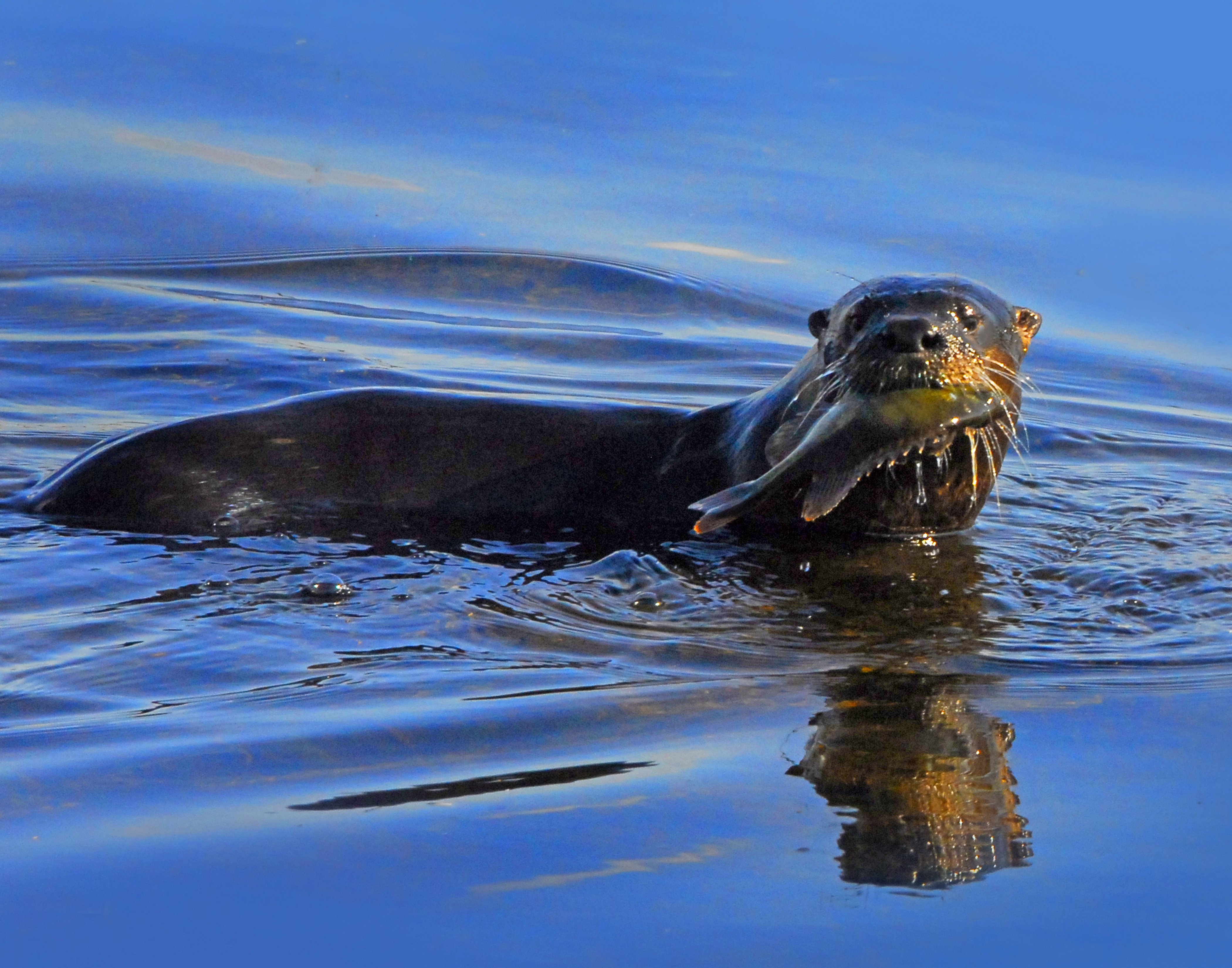 Otter at Lake Woodruff